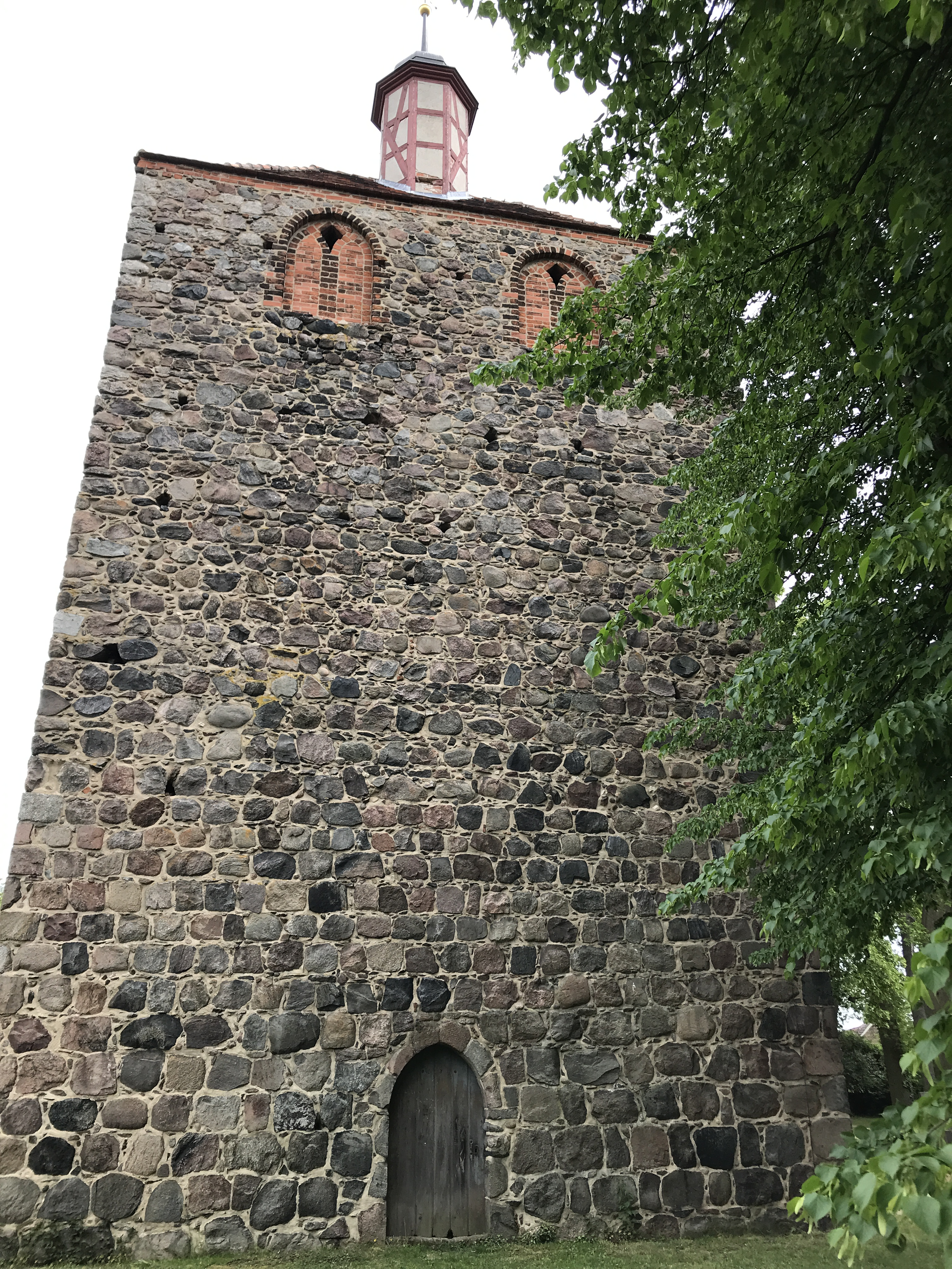 Die Dorfkirche Frankenfelde ist eine Feldsteinkirche aus der zweiten Hälfte des 13. Jahrhunderts. Im Innenraum steht unter anderem ein polygonaler Kanzelkorb aus der Zeit um 1700.